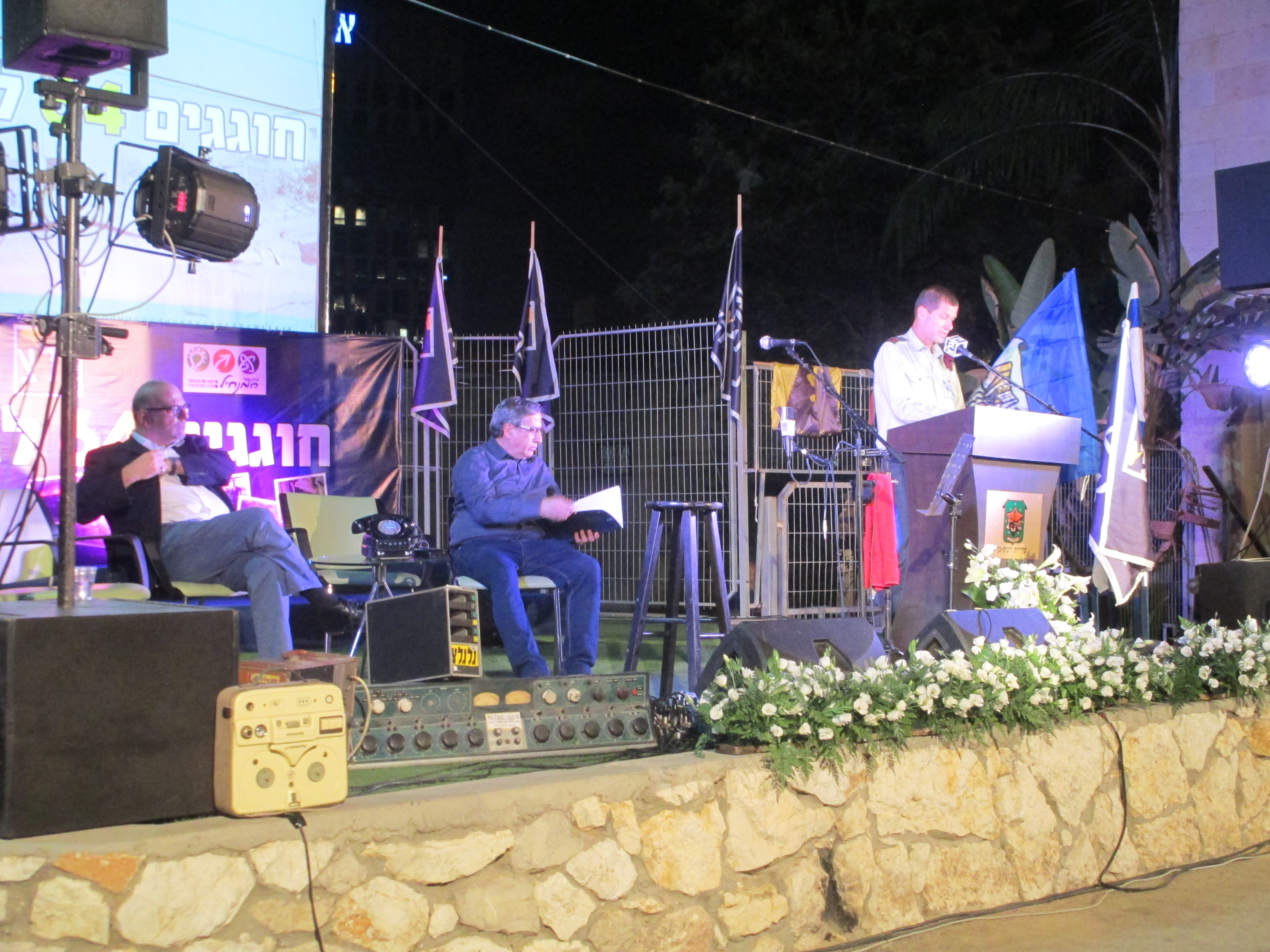 חגיגת 64 שנים לגלי צה"ל. נואם-קצין חינוך ראשי תא"ל אבנר פז צוק, ראש עיריית ר"ג ישראל זינגר, מפקד גלי צה"ל ירון דקל